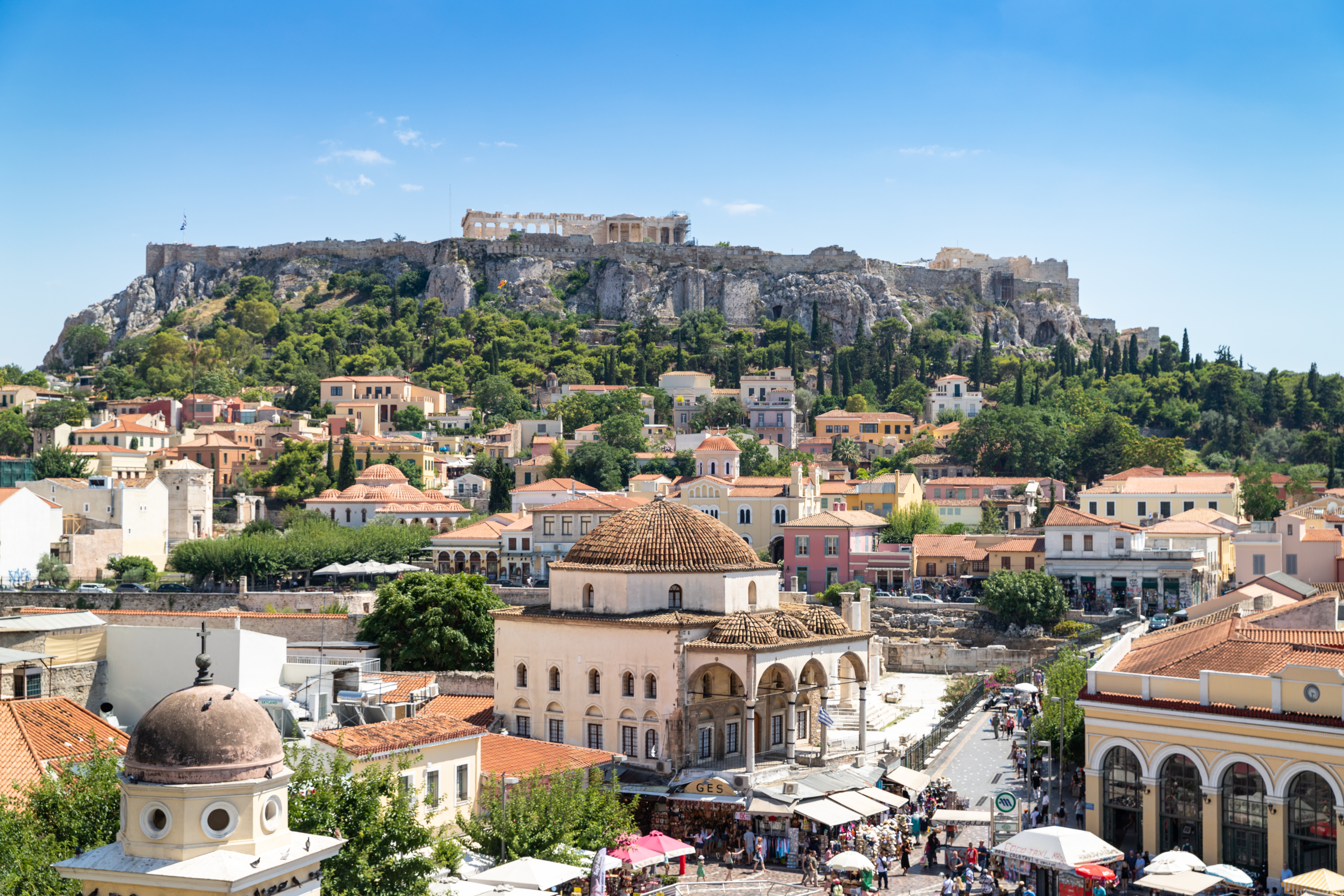 Athen, Griechenland